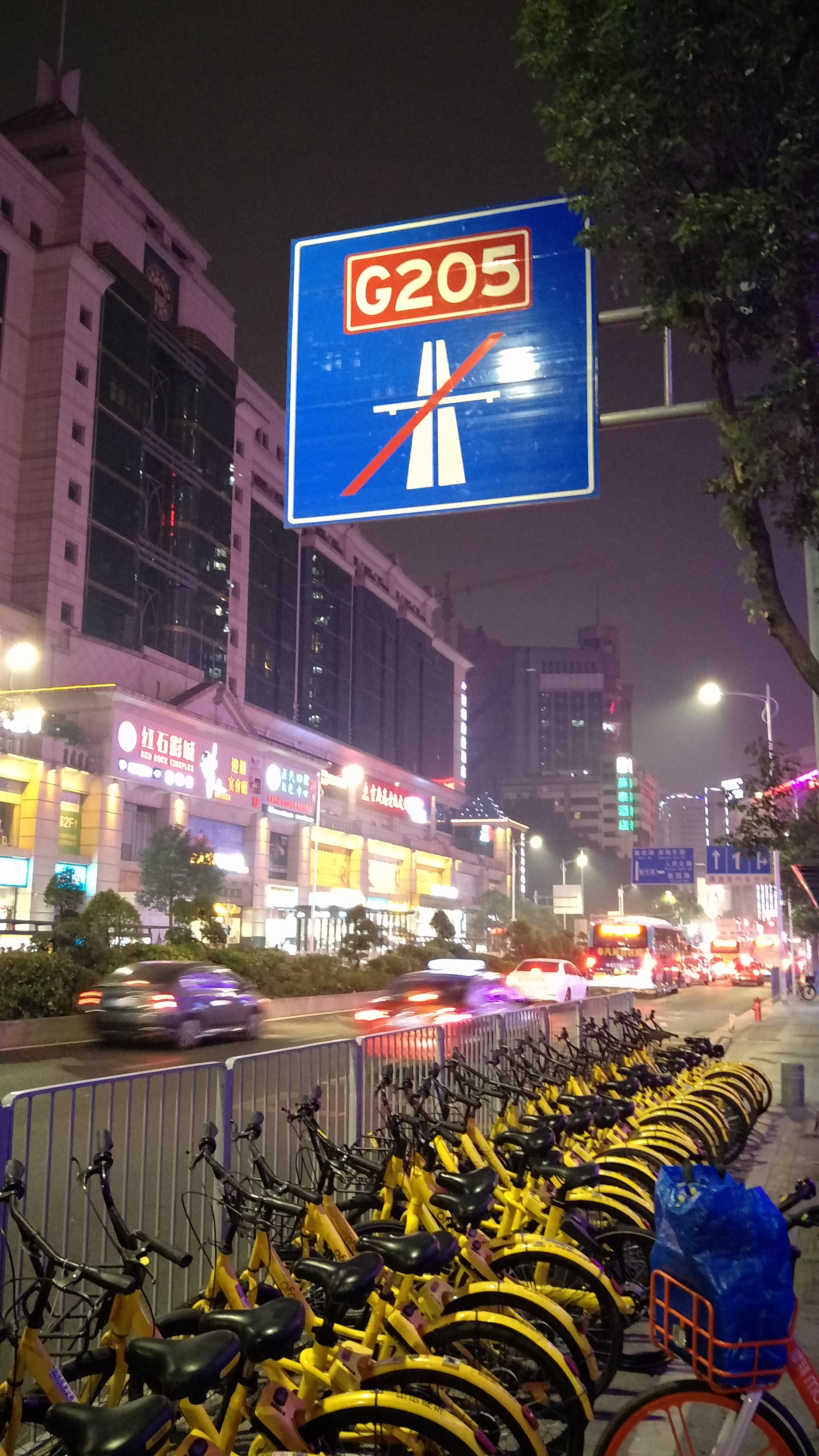 中文（中国大陆）: 205国道位于深圳东门晒布路口的终点路牌